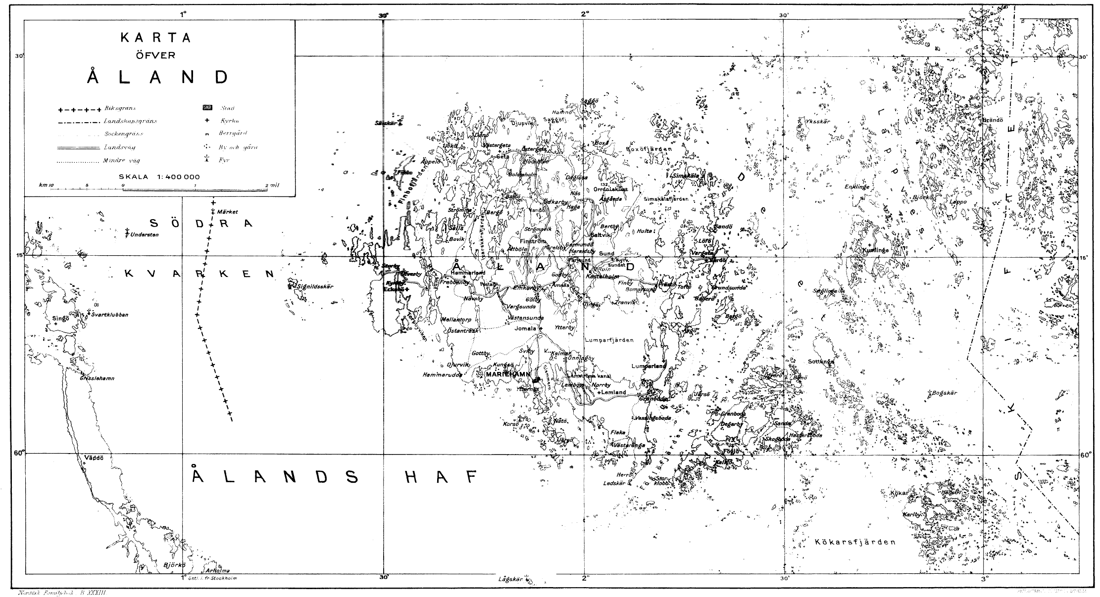 Karta öfver Åland.